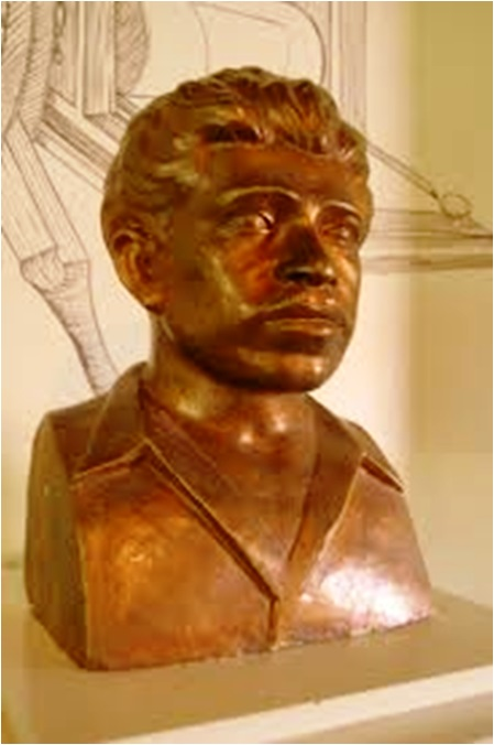 Franco Lázaro Gómez